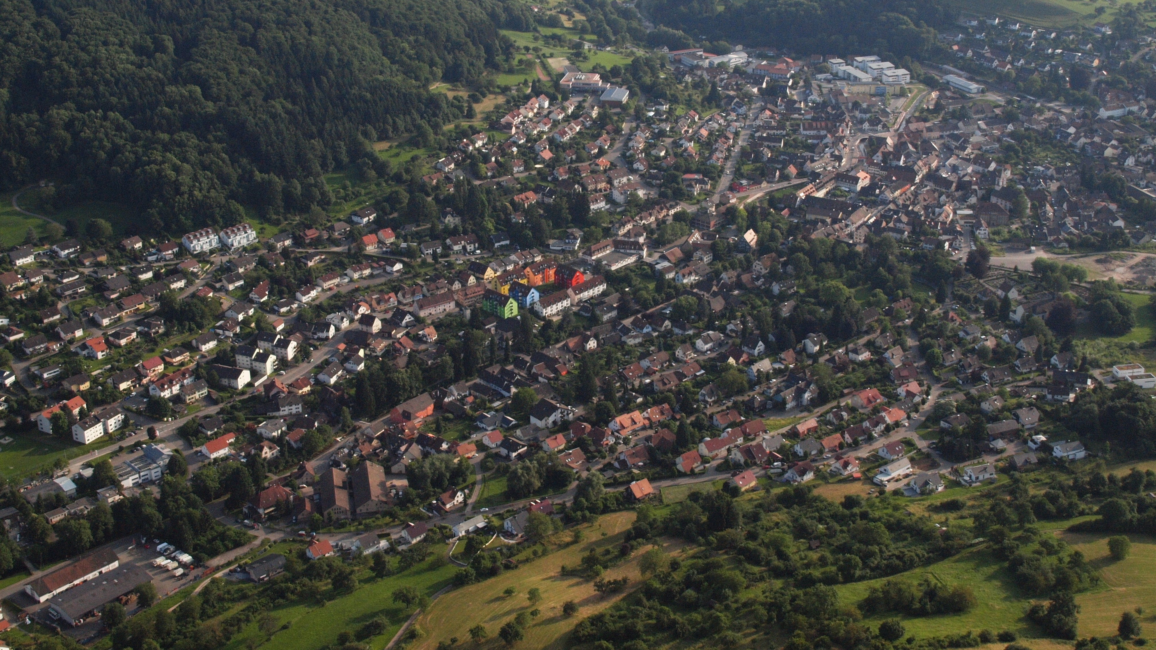 Kandern: Luftaufnahme aus nordöstlicher Richtung